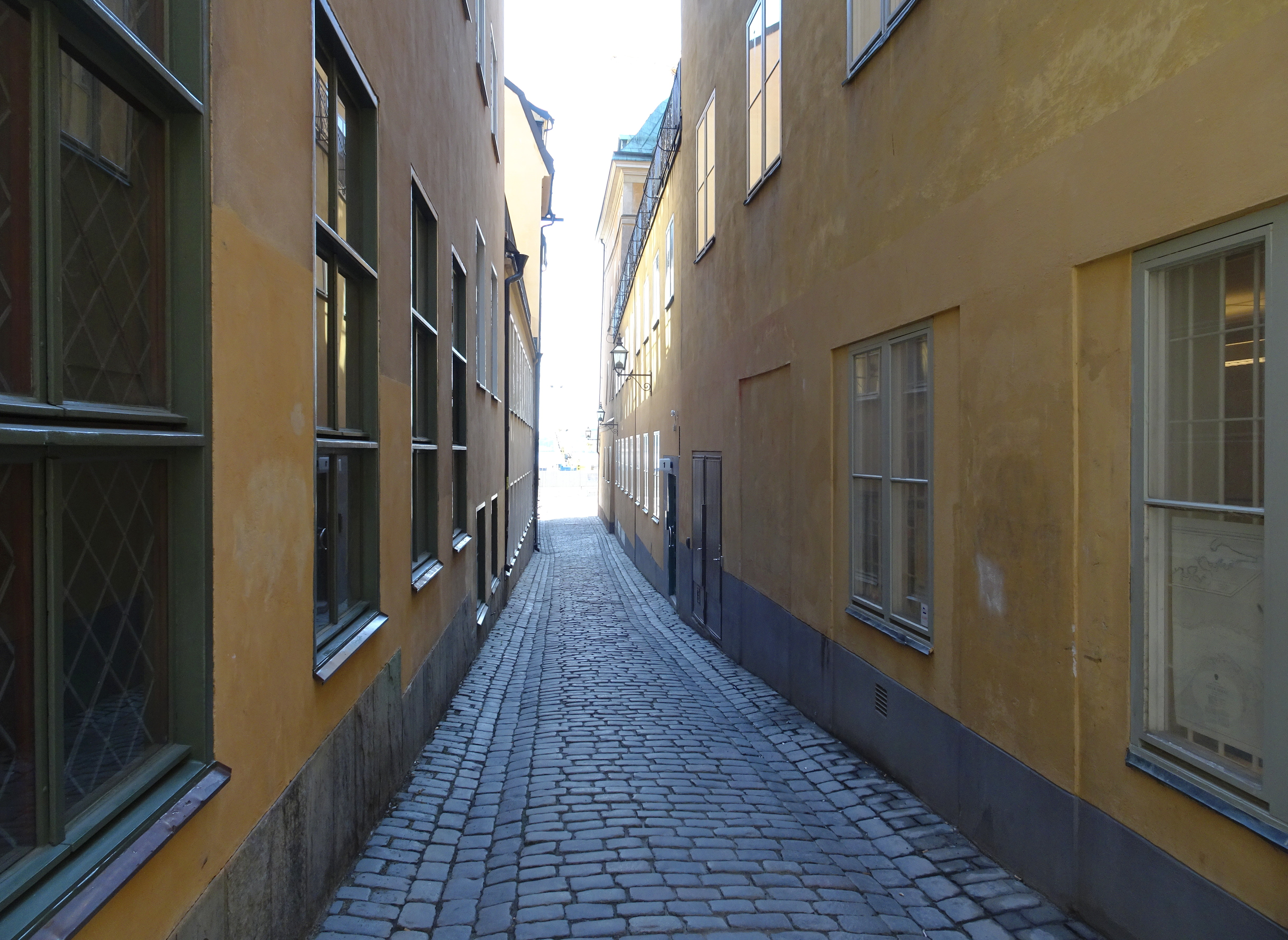 Södra Dryckesgränd mot Skeppsbron